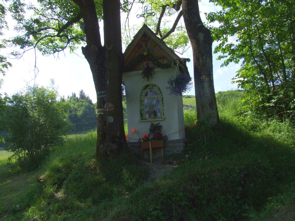 Kapliczka matki Wł. Orkana